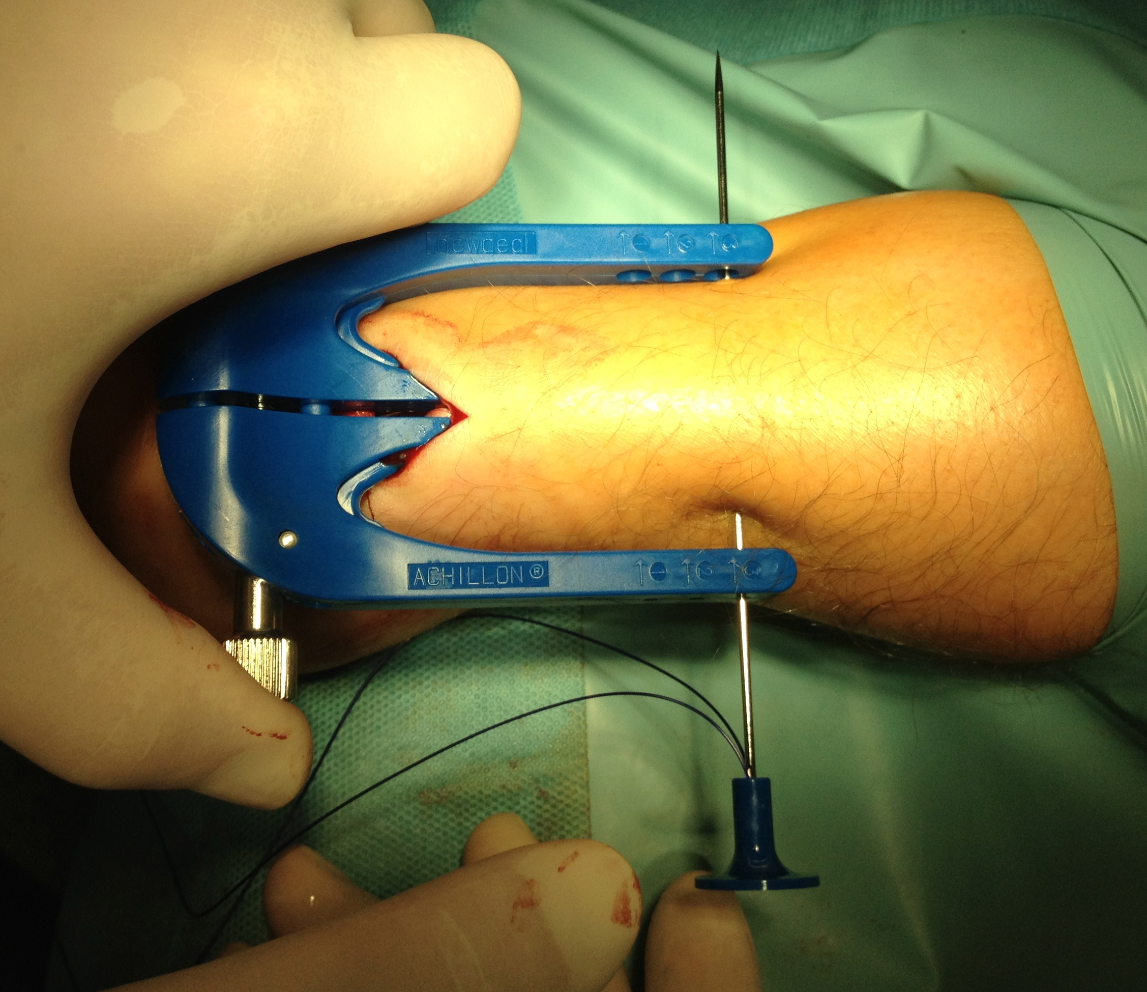 Achillessehnennaht MIC-Technik. Vorlegen eines Fadens proximal mittels Zielgerät